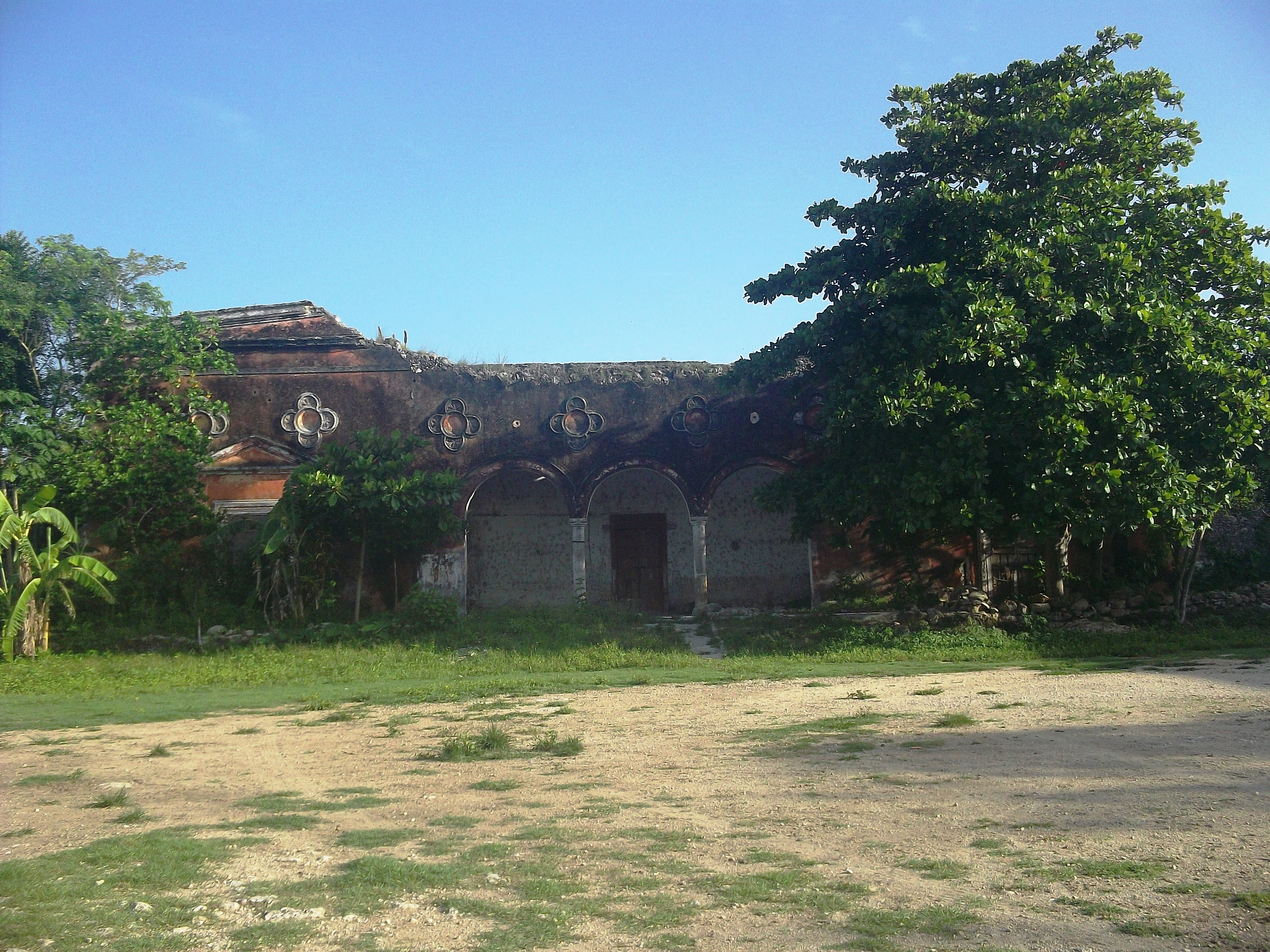 Hacienda de San Francisco Dzon, Yucatán.